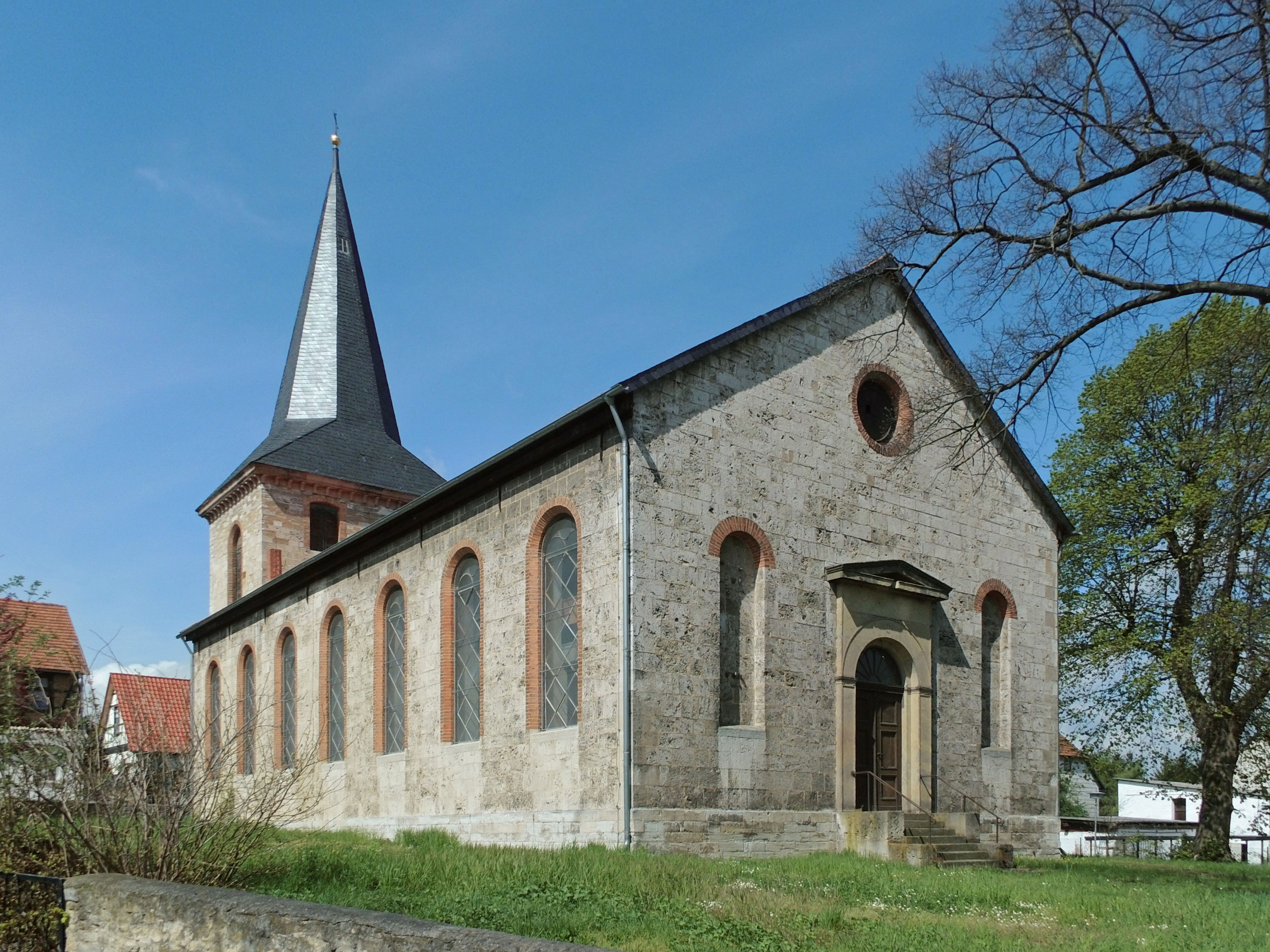 Evangelische St.-Jacobi-Kirche in Hessen (Sachsen-Anhalt).